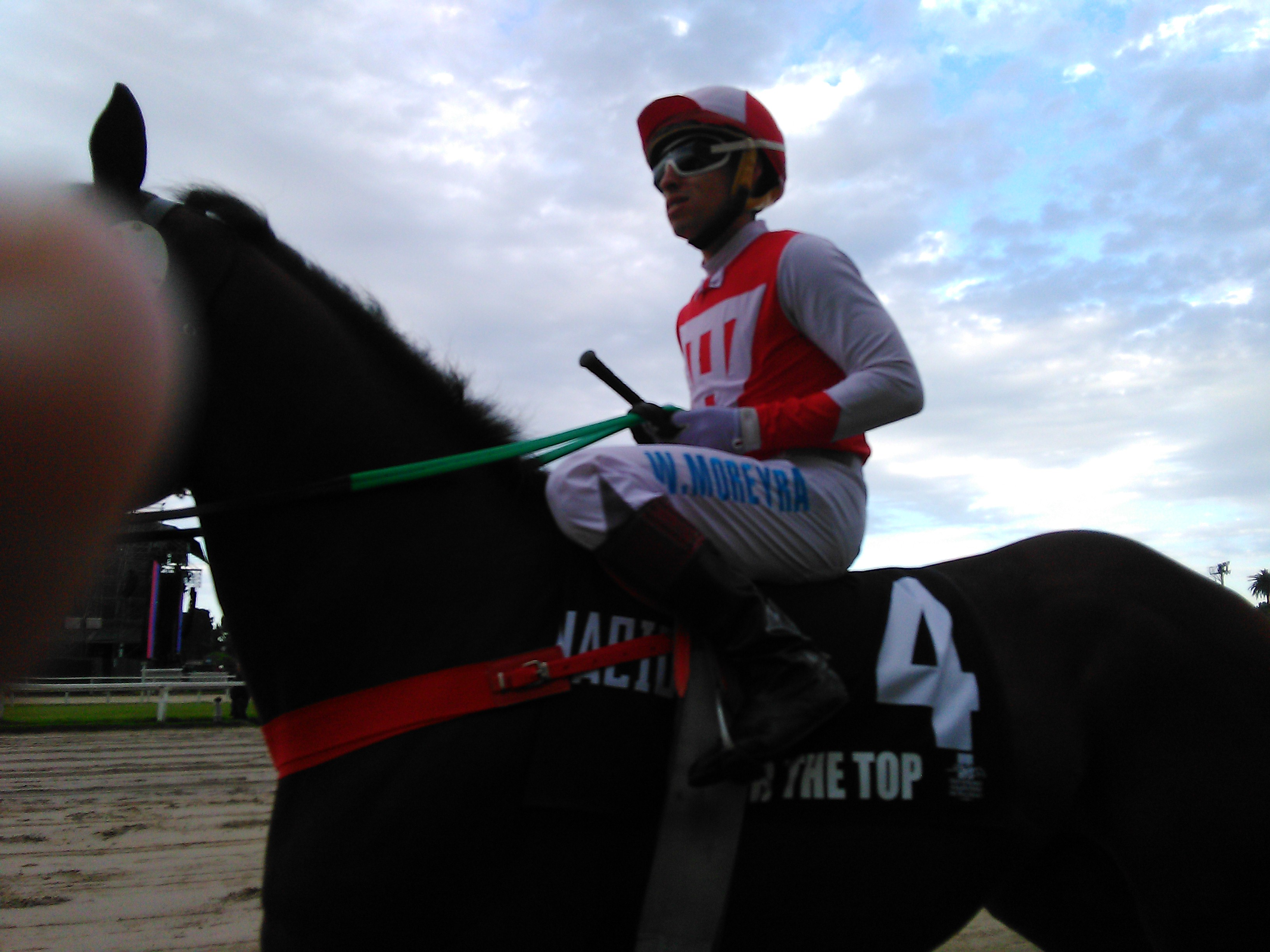 For The Top regresando hacia la premiación, el viernes 16 de Noviembre de 2018 en el Hipódromo Argentino de Palermo, Buenos Aires, luego de ganar el Gran Premio Nacional, el Derby Argentino.